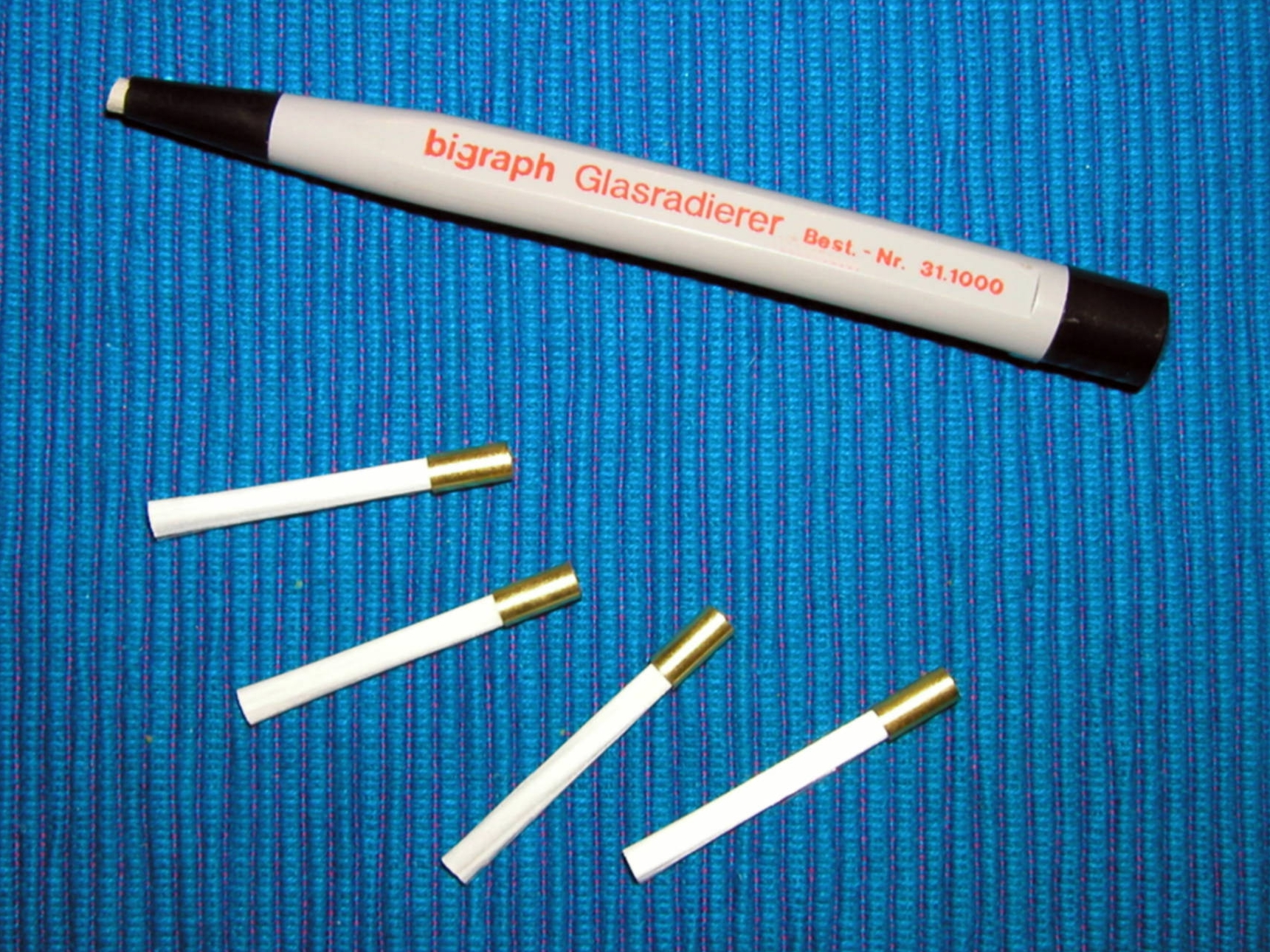 Glasfaserradierer der Firma Bigraph mit Einsätzen